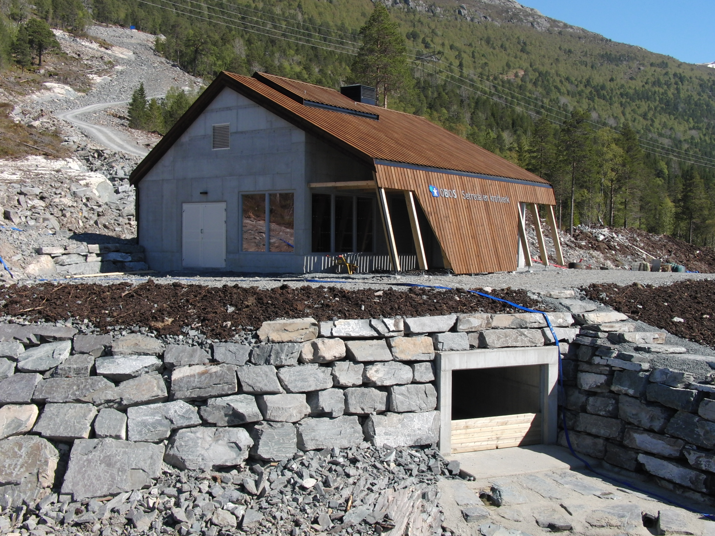 Setredalen kraftverk